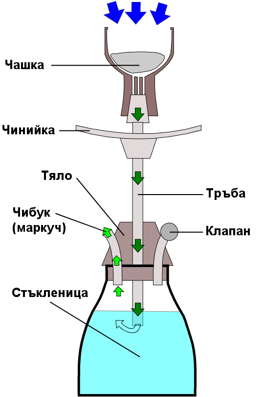 Схема на наргиле базирано на този файл от Smackware адаптирано на български